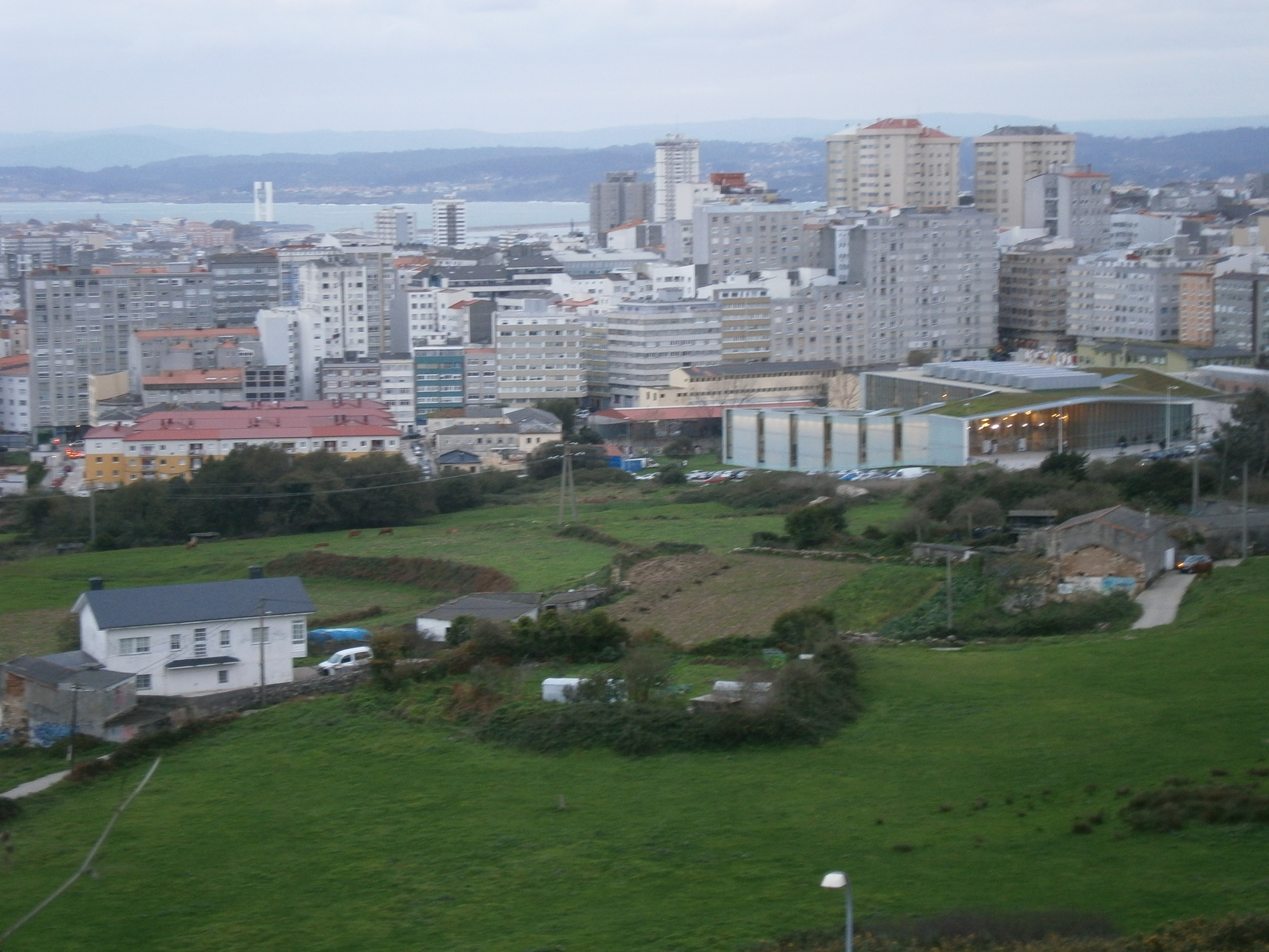 Vista da Gramela e da Coruña